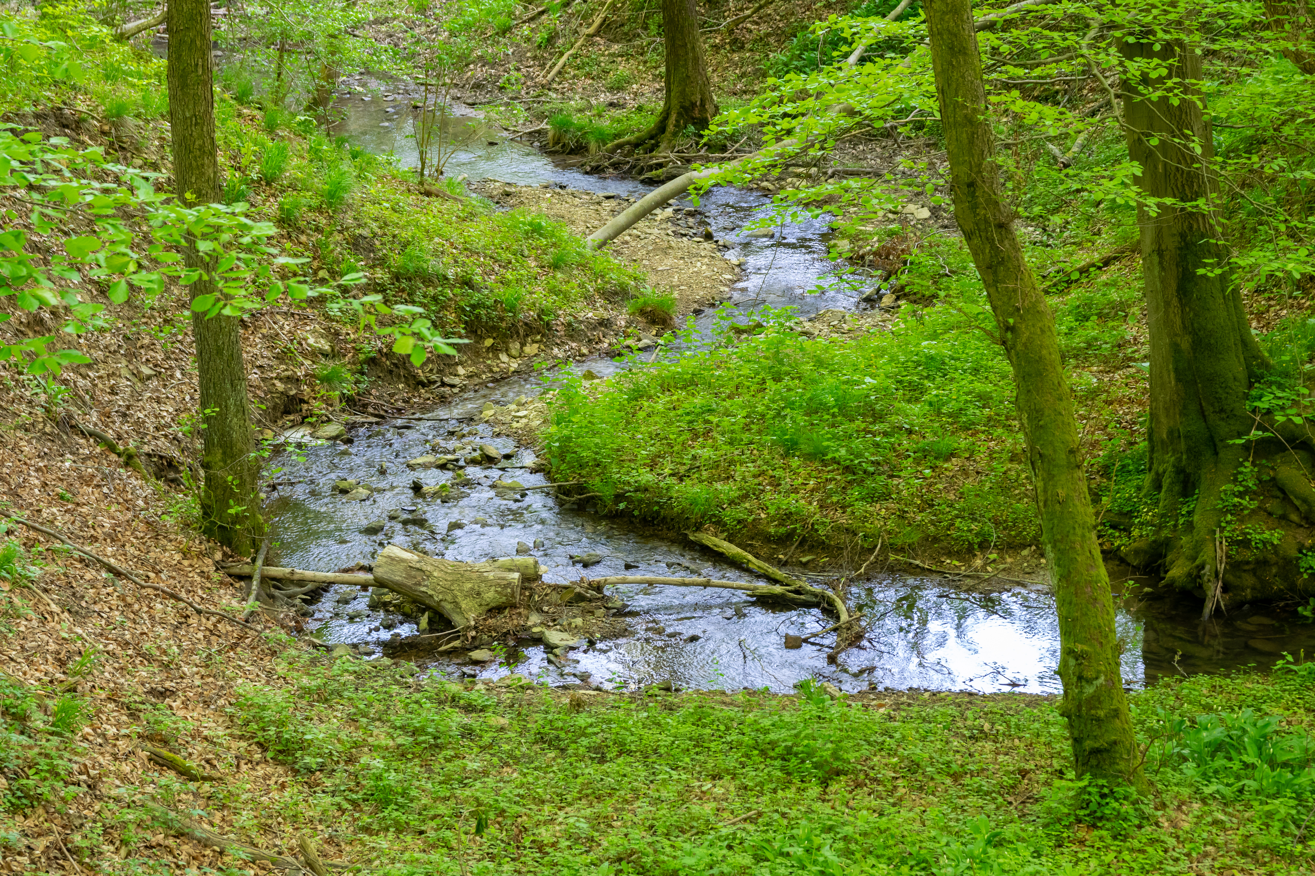 Naturschutzgebiet Hinnenburger Forst mit Emder Bachtal, Kreis Höxter; Emder Bach